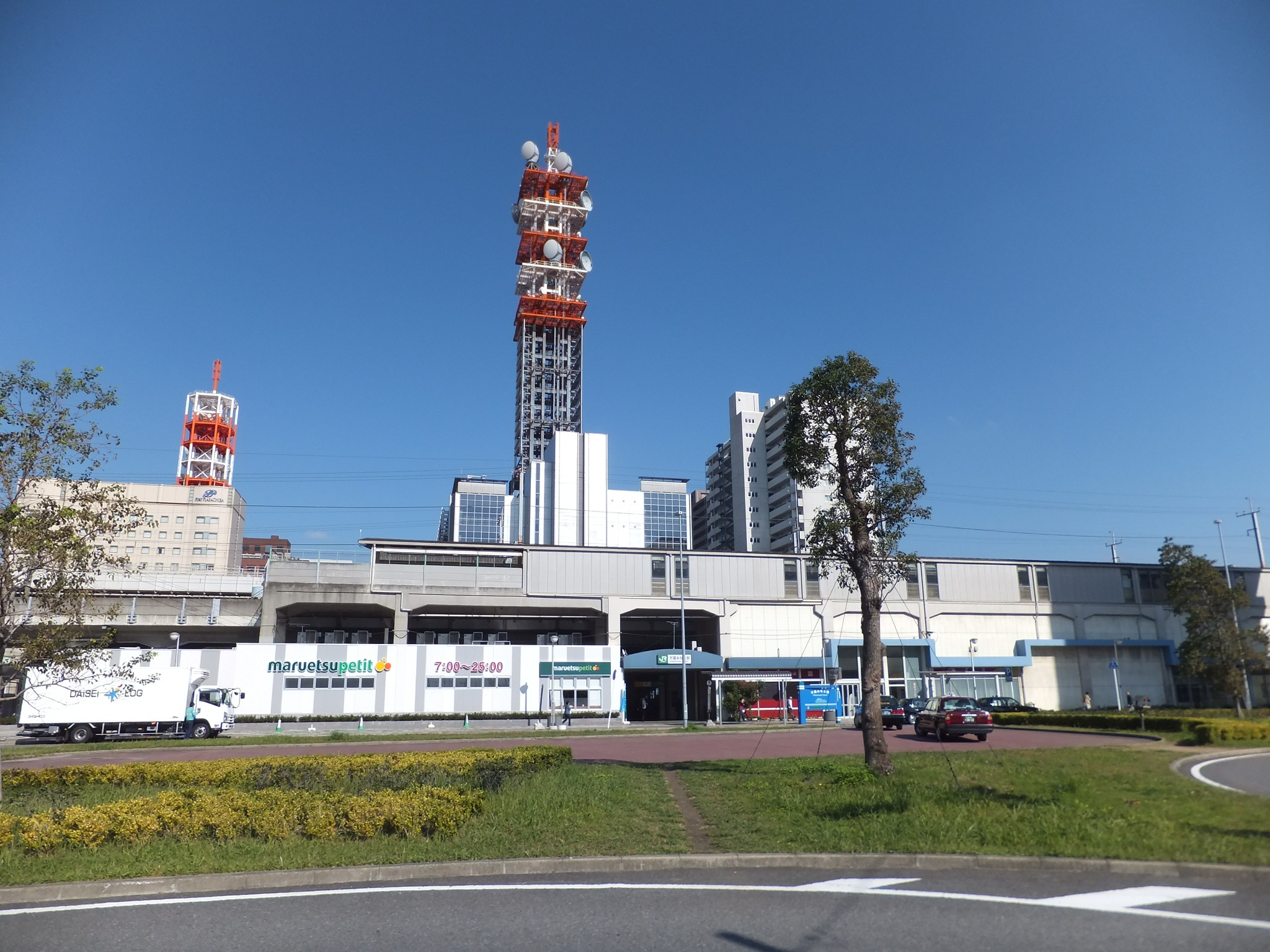 京葉線千葉みなと駅西口から